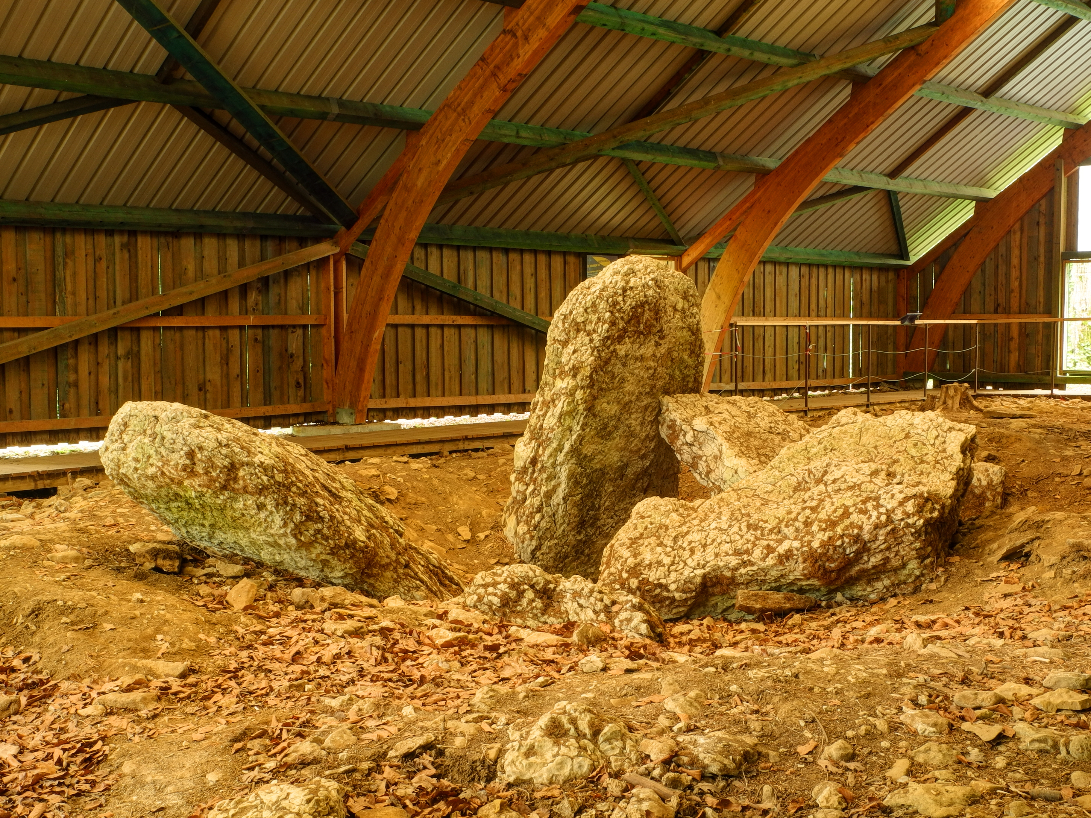 Dolmen de Brevilliers, classé Monument Historique sous le n° PA00102125 (HDR).